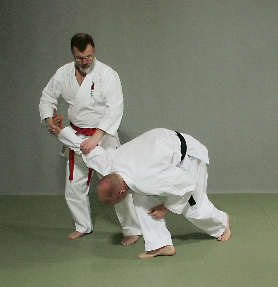 Ju-jutsu Ude osae